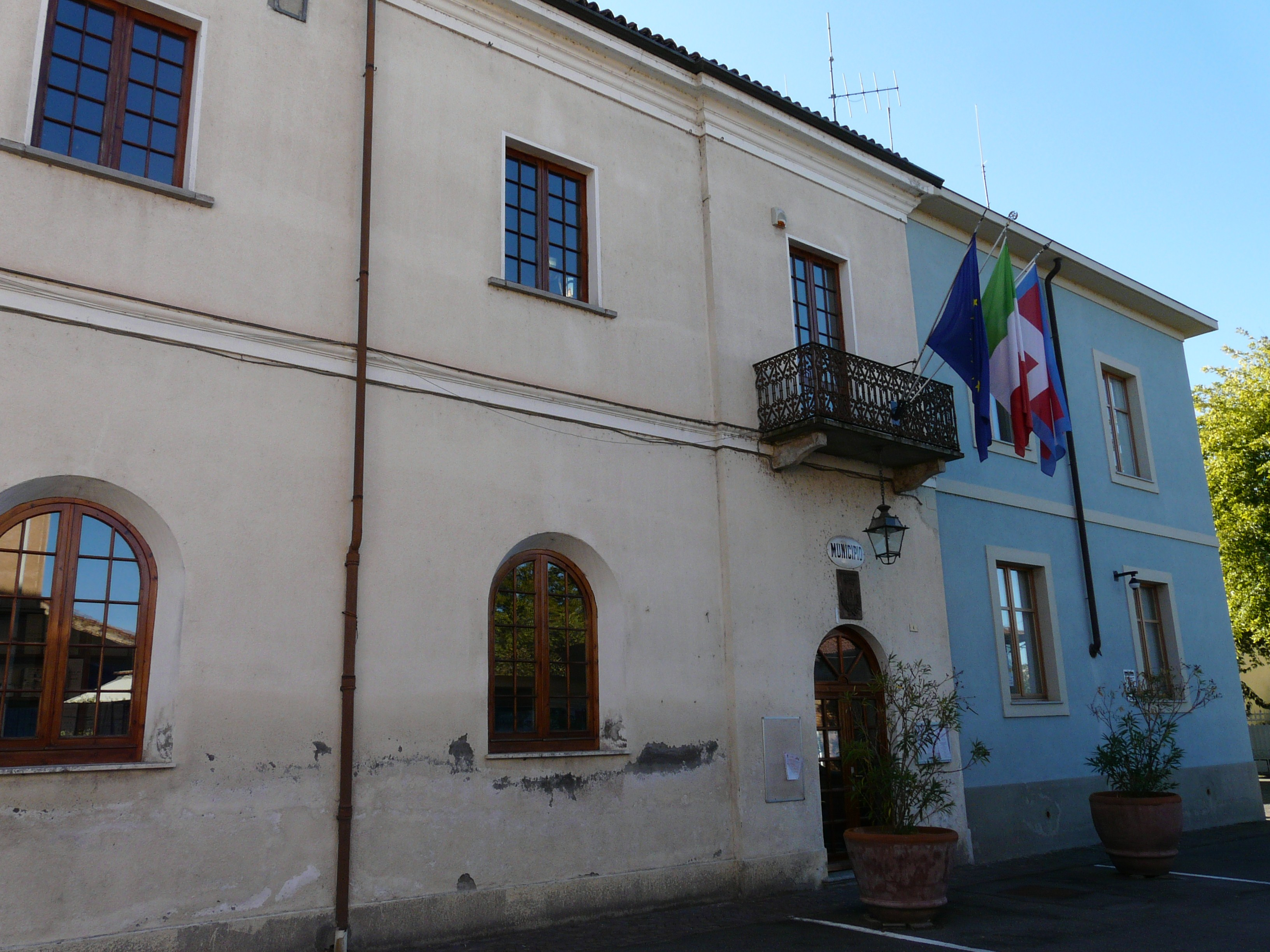 Municipio di Piovera, Piemonte, Italy